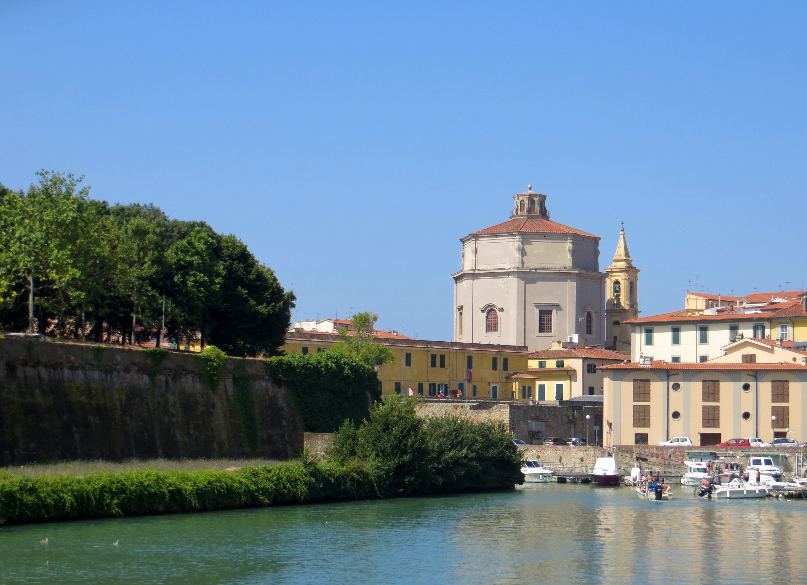 Veduta della Chiesa di Santa Caterina dagli Scali delle Cantine